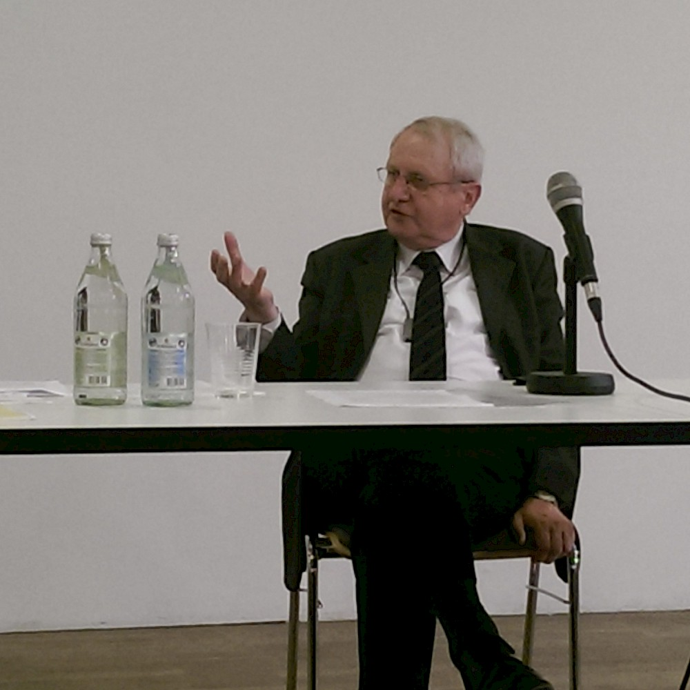 Vortrag und Diskussion zum Islam in München St. Ludwig